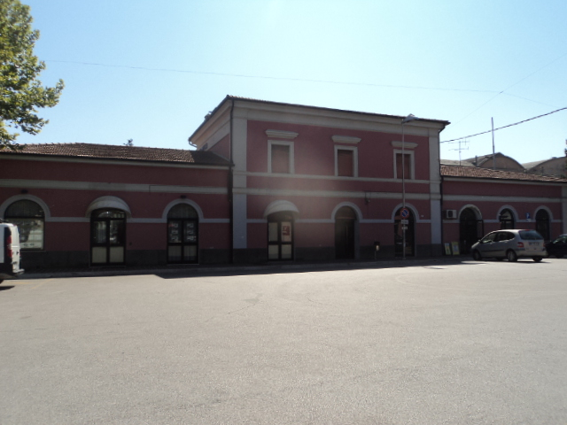 Stazione di Narni-Amelia.